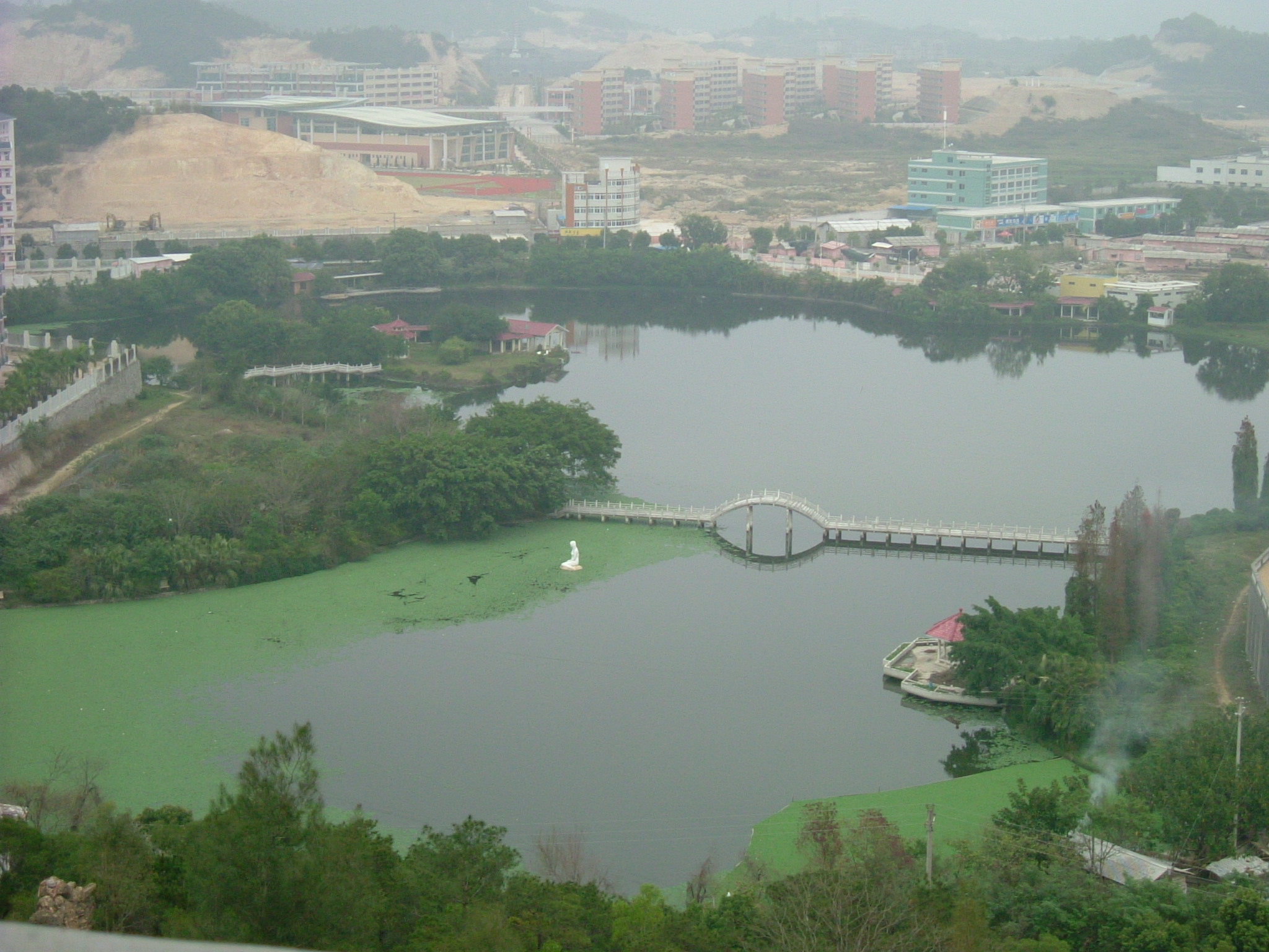 潮州西湖 ChaoZhou West Lake